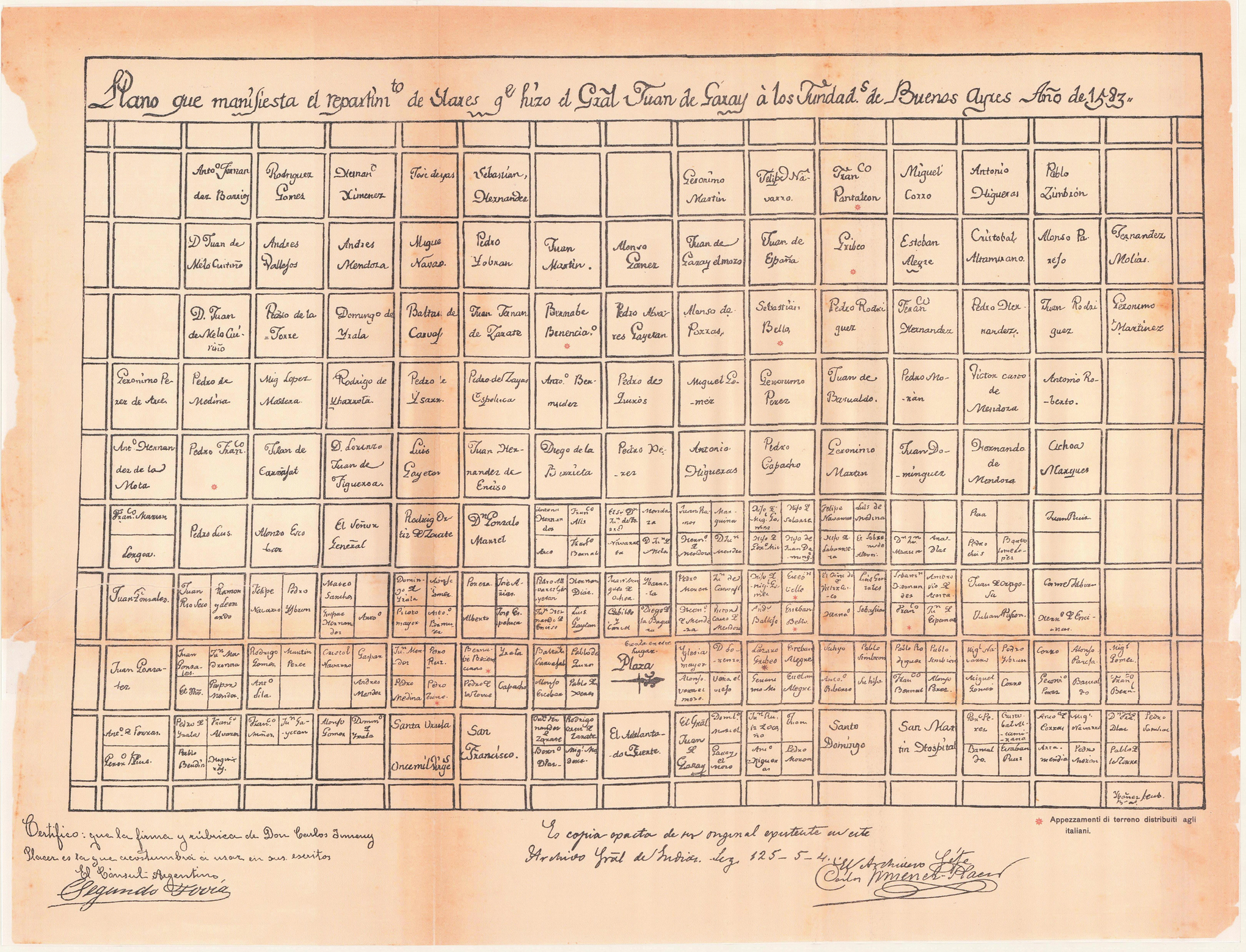 Plano de la ciudad de la Santísima Trinidad y el puerto de Santa María del Buen Ayre, fundados por Don Juan de Garay en 1580. Se ve el parcelamiento original del centro urbano.